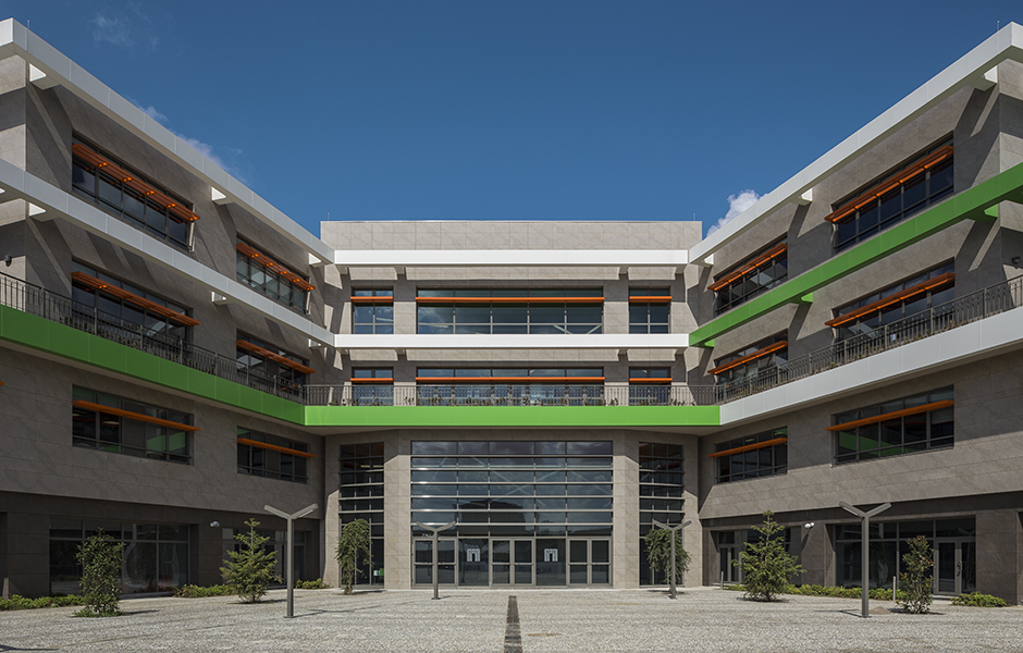 Sev Amerikan Arka Kampüsü